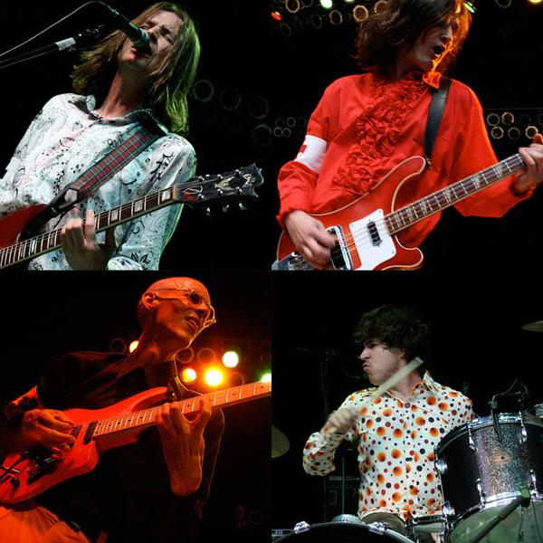 Redd Kross